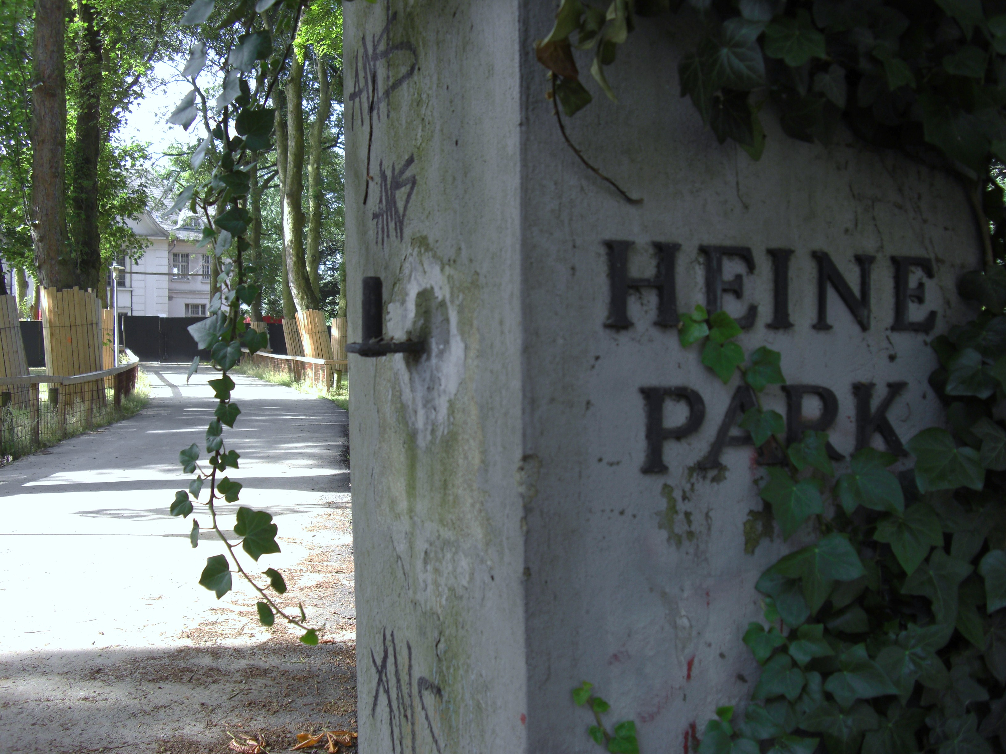 Heine-Park in Hamburg Altona, Eingang und im Hintergrund die denkmalgeschützte Villa (Elbchaussee 43).